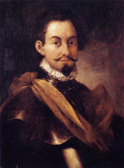 Obwohl Leinwandportäts in Italien bereits um 1530 aufkamen, deuten verschiedener Indizien – der dargestellte Faltenkragen kam erst nach 1560 auf, der Typus der Feldbinde erst Ende des 16. Jahrhunderts – darauf hin, daß das Porträt nicht zeitgenössisch ist. Nach einem Luftangriff im April 1945 wurde das Bild beschädigt aus dem von Balthasar Neumann gebauten Hutten-Schloß Steinbach bei Lohr geborgen. Dabei ging auch die ursprüngliche Bildunterschrift verloren. Nach einer Zeugenaussage von Ilse von Hutten soll diese geheißen haben "Philipp von Hutten. Vice-König von Indien. 1546 von Carvesal ermordet. Der Mörder aber gevierteilt". Diese sachlich fehlerhafte Unterschrift legt ebenfalls eine spätere Entstehungszeit nahe.